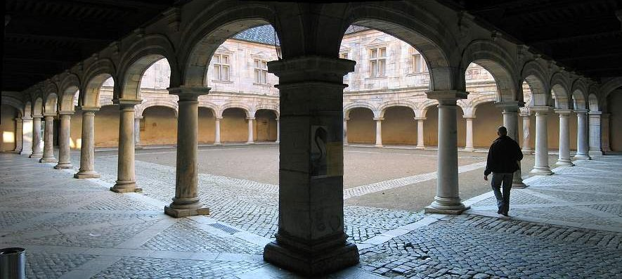 Panoramique de la cour du Palais Granvelle de Besancon - Franche Comté